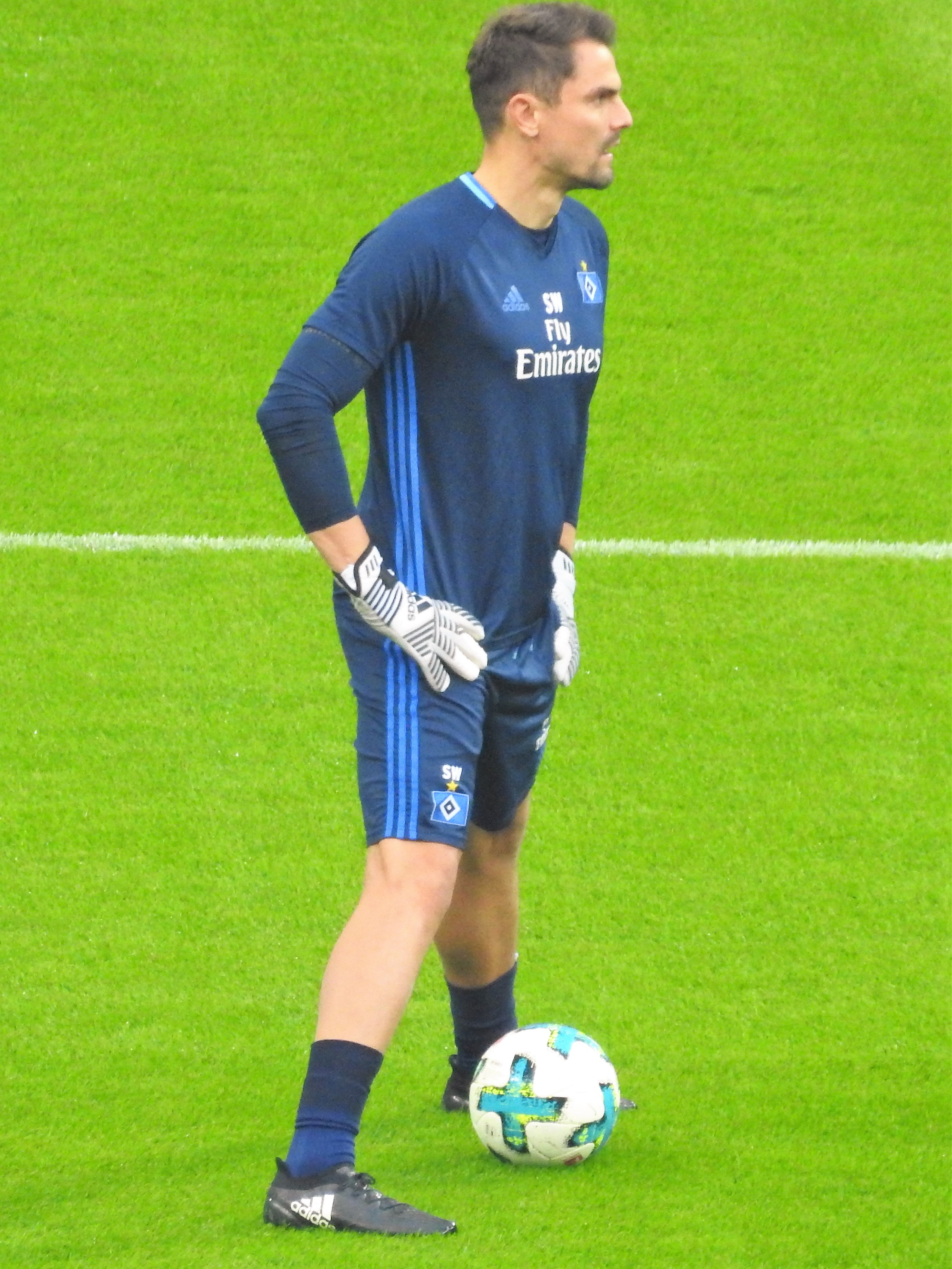 Wächter, Stefan TW-Trainer HSV